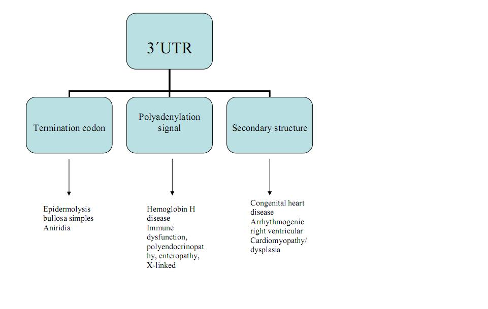 Participación de varios elementos reguladores de las regiones 5´- 3´ UTR de RNAm en varias enfermedades.